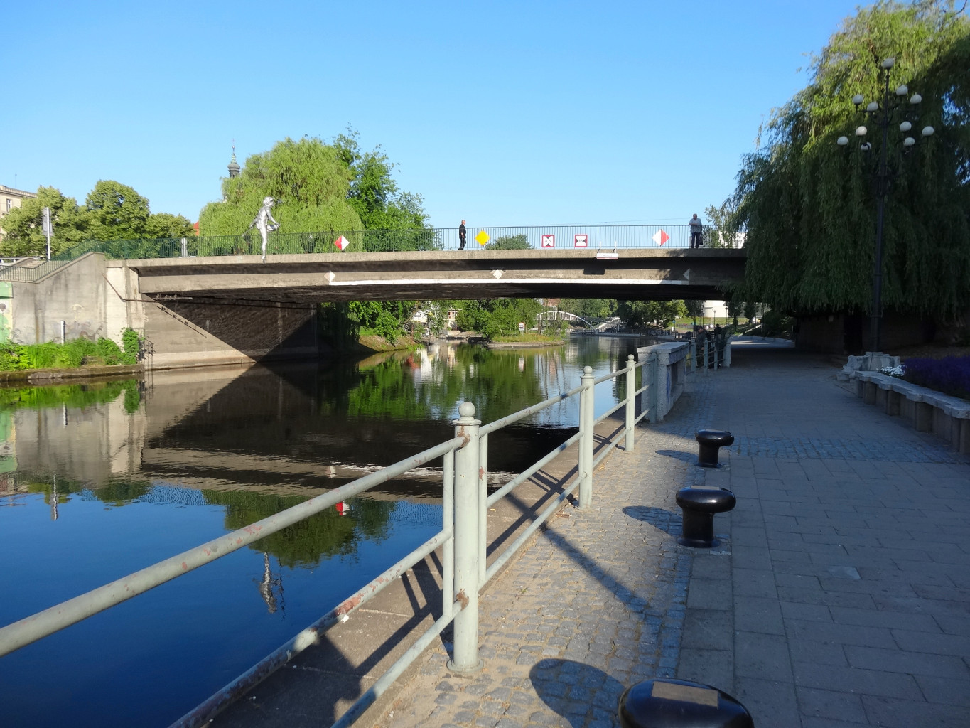 Most Staromiejski im. Jerzego Sulimy-Kamińskiego nad Brdą w Bydgoszczy